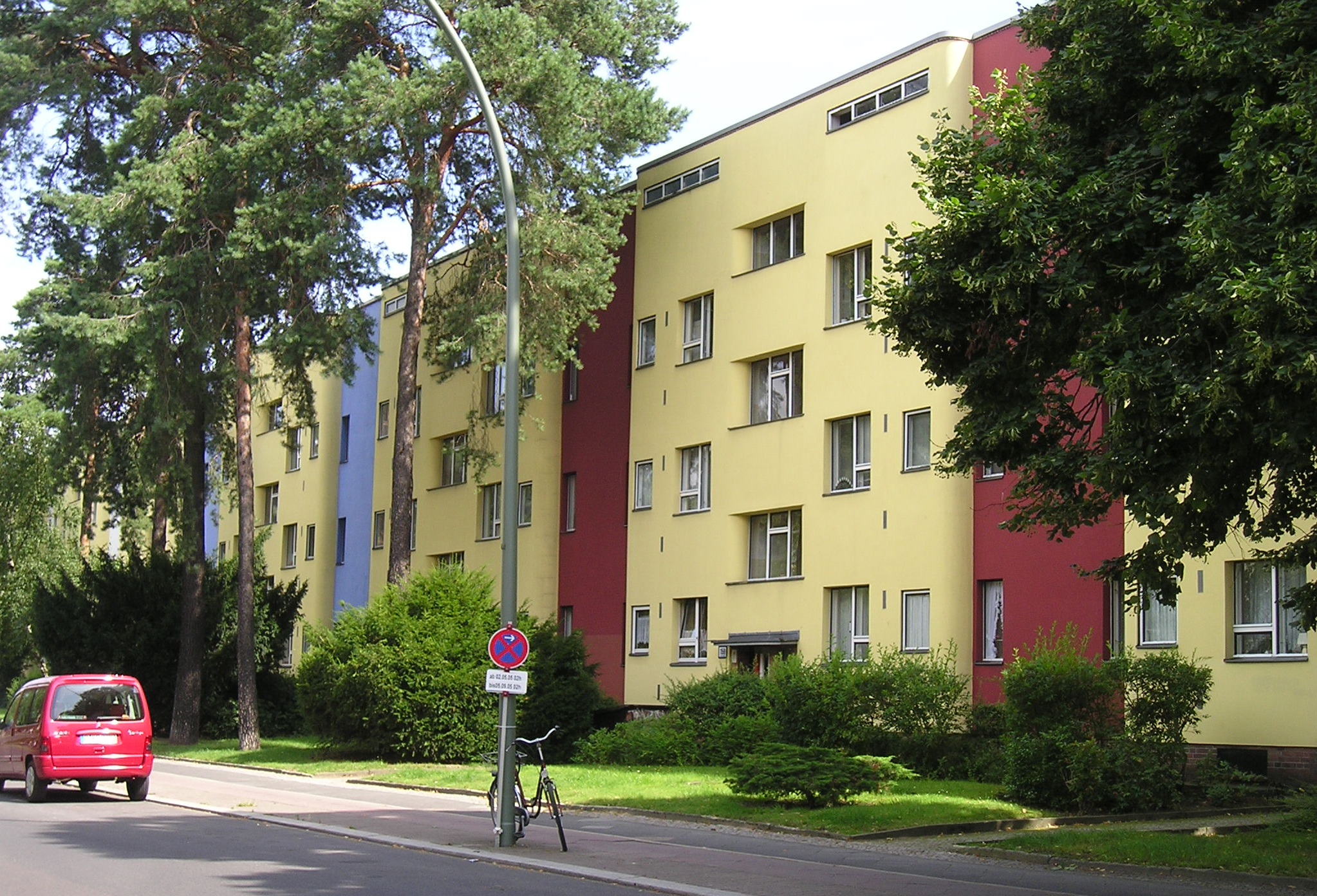 Argentinische Allee in Berlin-Zehlendorf